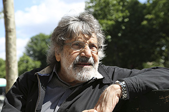 Retrato de Carlos Cruz-Diez, en París, Francia, 2013